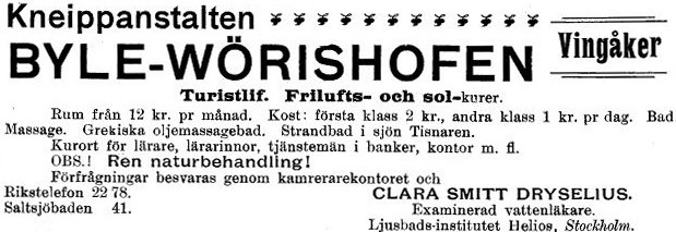 Tidningsannons för Kneipanstalten Byle-Wörishofen i Vingåker